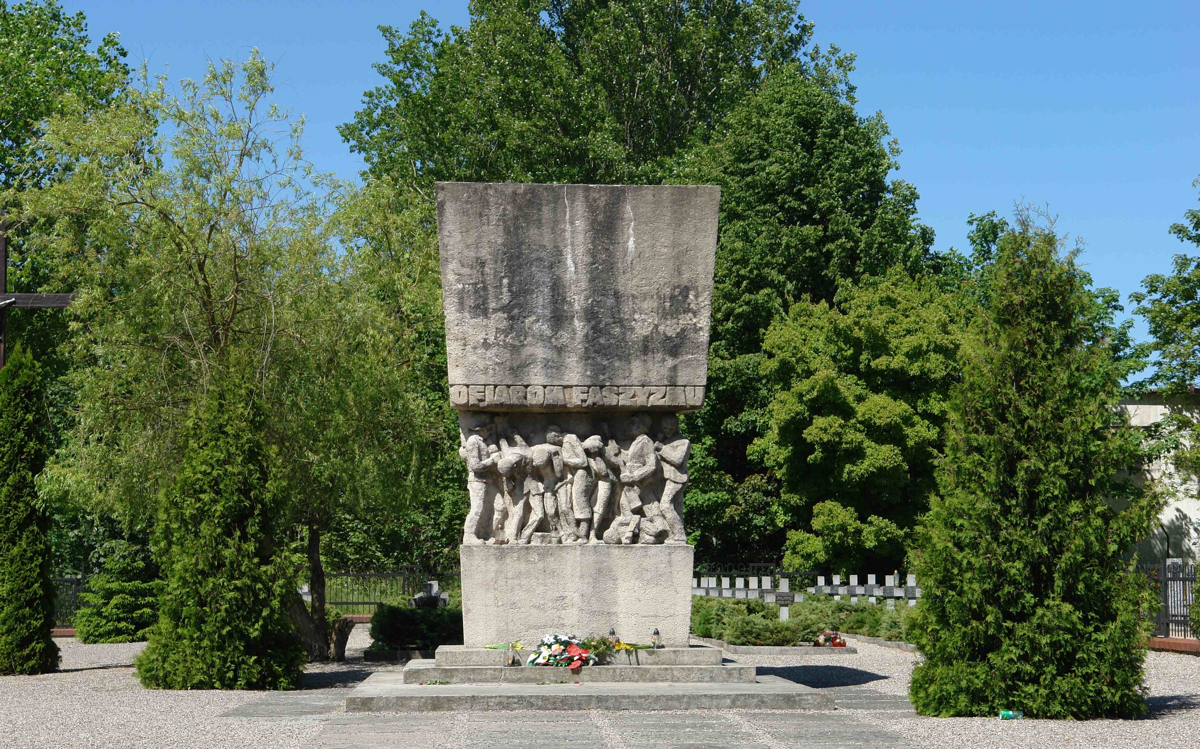 Potulice - cmentarz wojenny ofiar niemieckiego terroru hitlerowskiego z II wojny światowej (zabytek nr A/518/1)